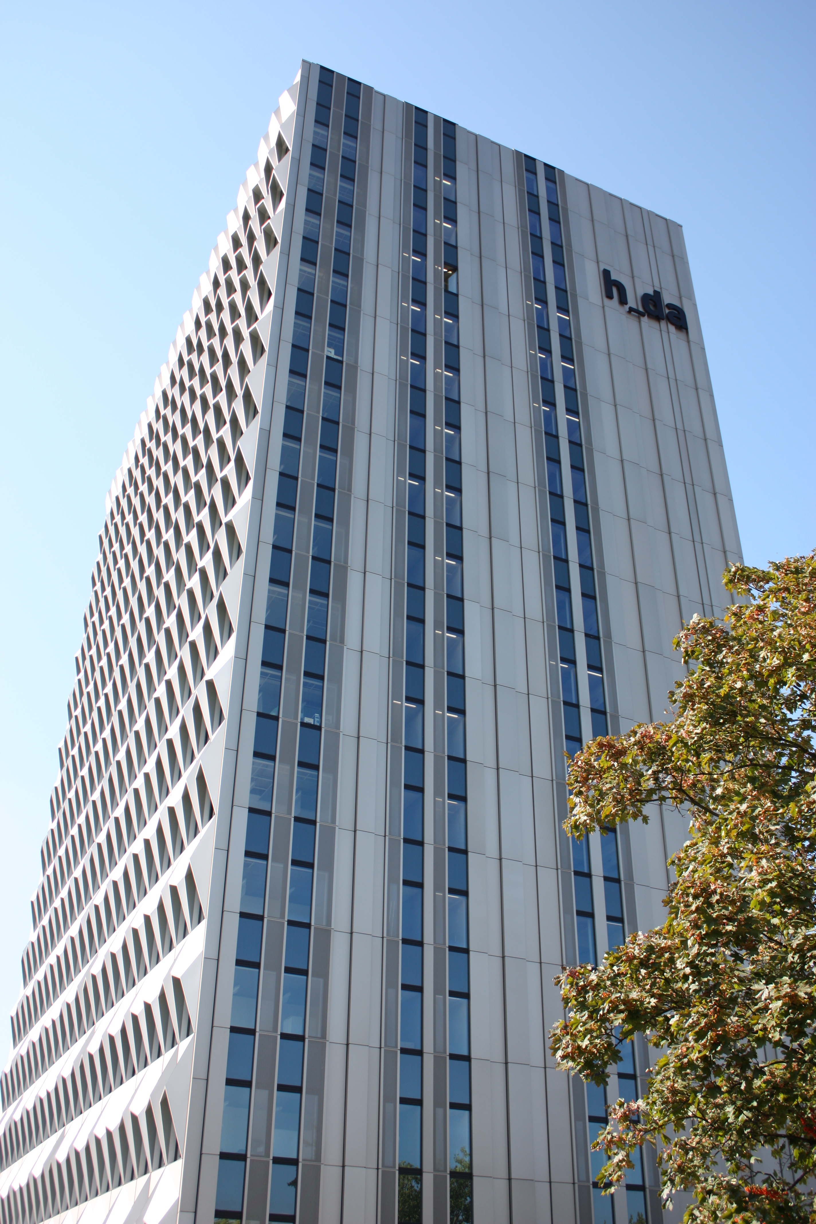 Hochhaus (Gebäude C10) der Hochschule Darmstadt (h_da)